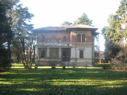 Villa Pagani Della Torre (vista frontale) a Corbetta (MI) - Italia